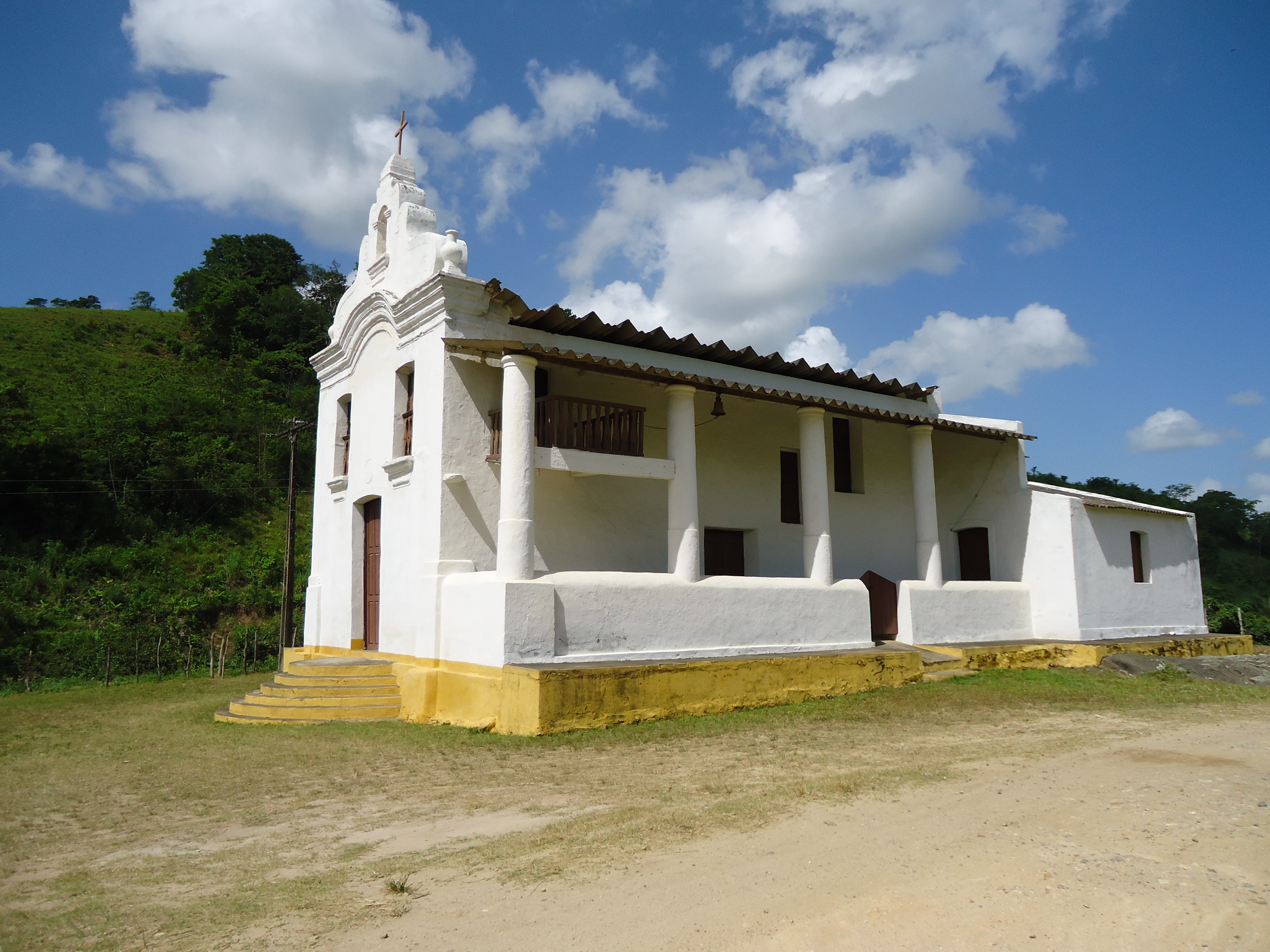 Secular Capela de Nossa Senhora Santana